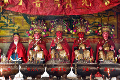 化州太祖廟五位大神